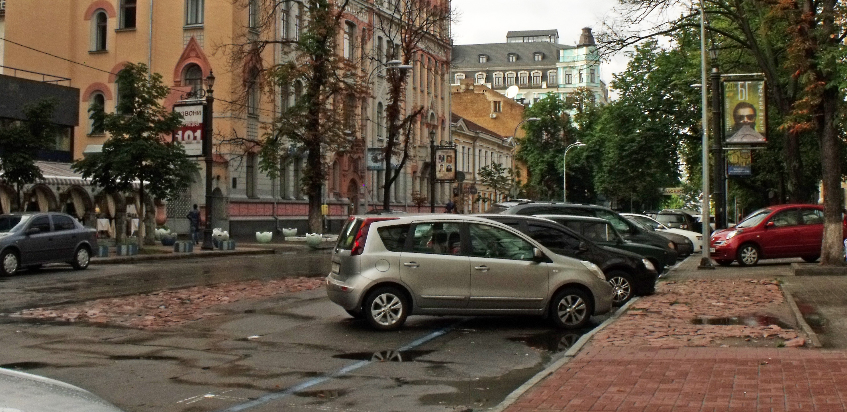 Фундаменти Софійських (Батиєвих) воріт, Київ, Володимирська вул., 11